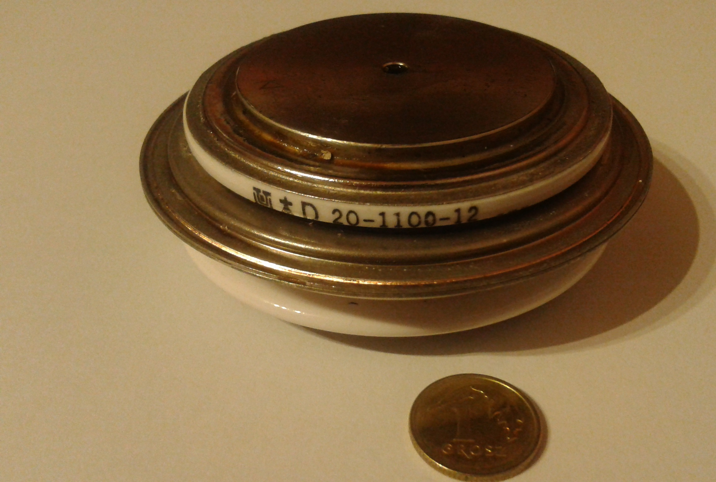 Dioda prostownicza 1100 A.